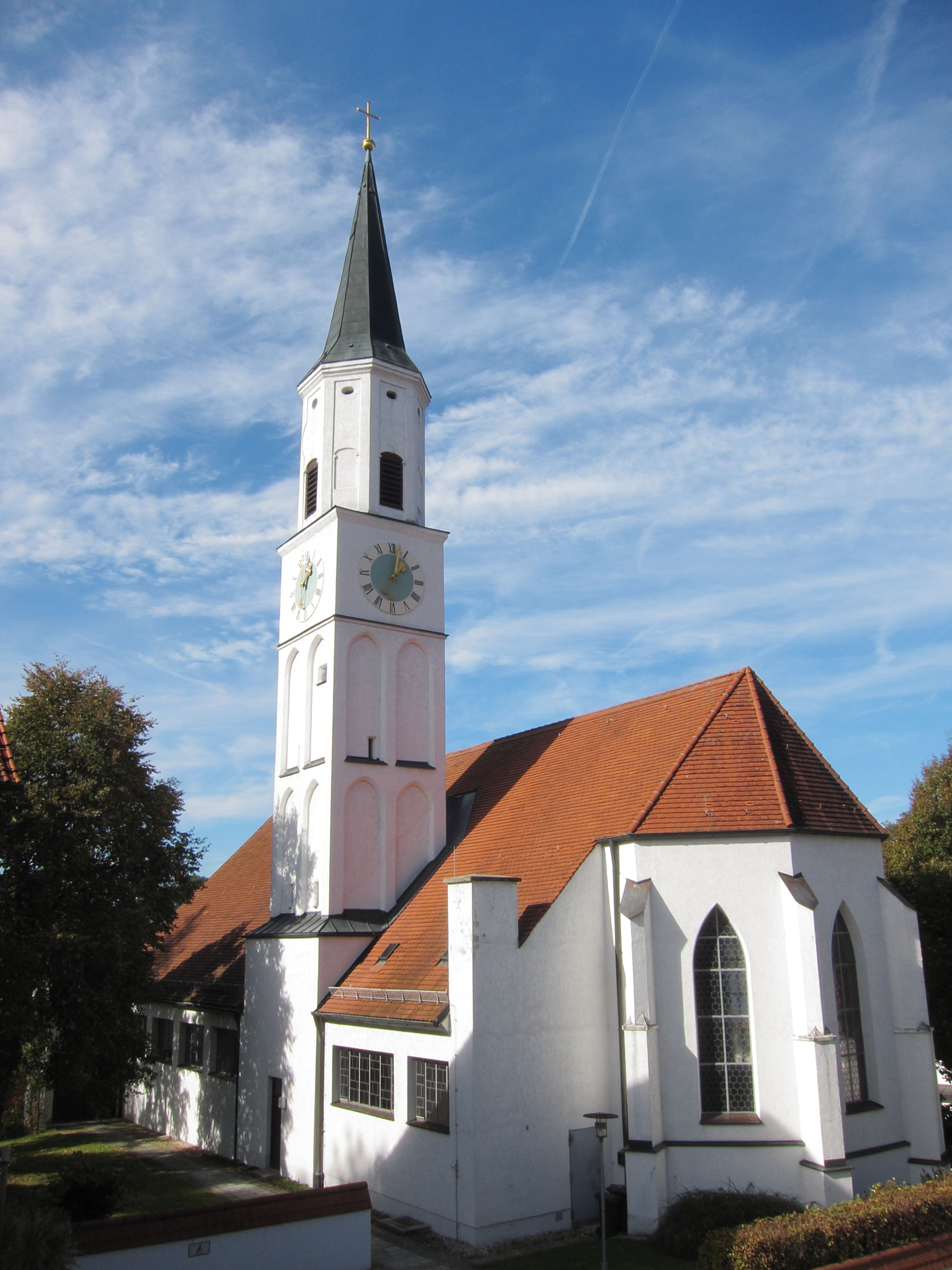 Buch am Erlbach; kath. Pfarrkirche St. Peter und Paul; Chor und Turmuntergeschosse gotisch, Langhaus modern; mit Ausstattung.